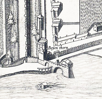 Ausschnitt des Mercator - Stadtplanes, Bereich südöstliche Stadtbefestigung mit Bayenturm und Ark um 1571